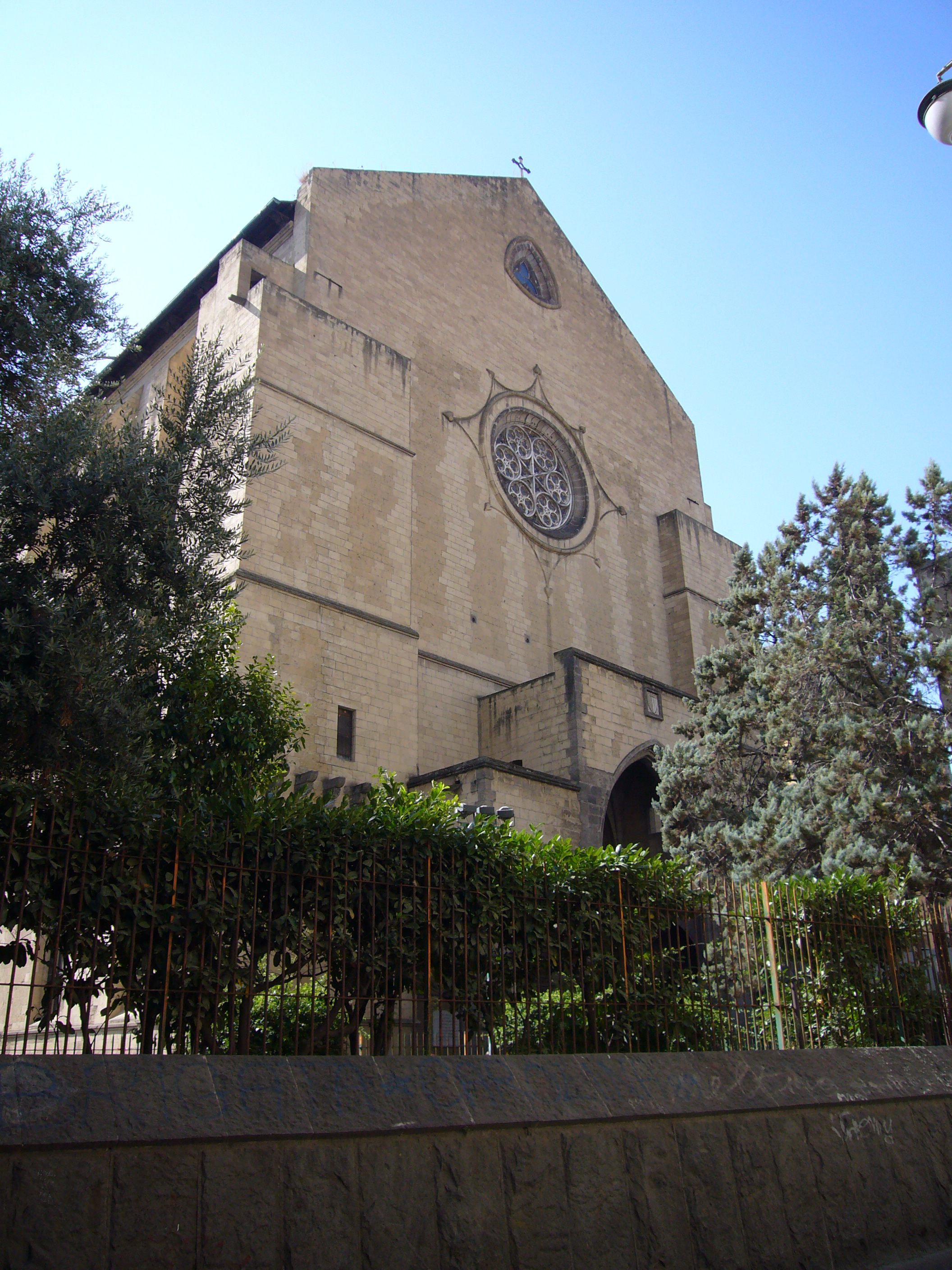 Napoli, Santa Chiara: facciata